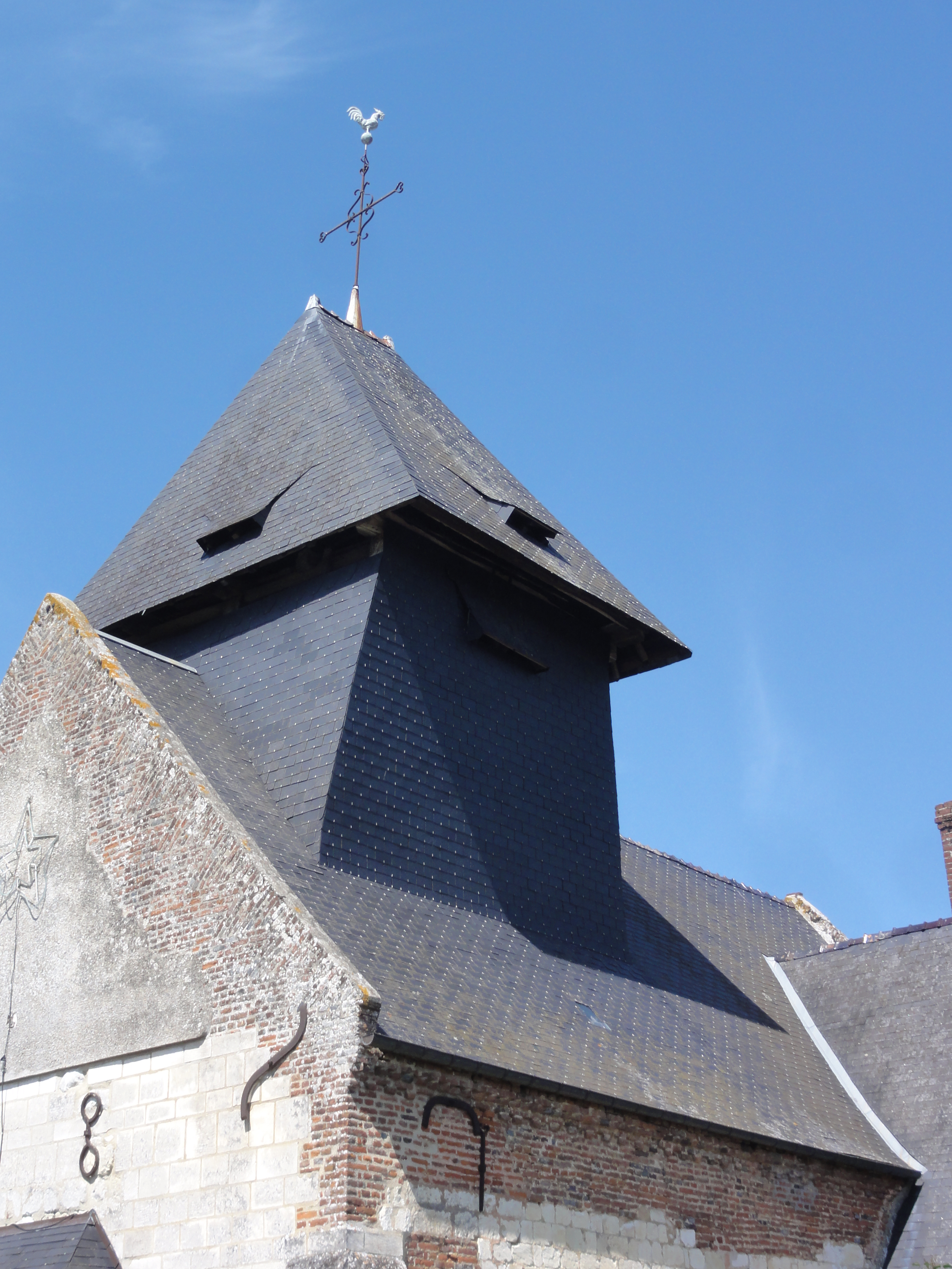 Marcy-sous-Marle (Aisne) église, toit du clocher